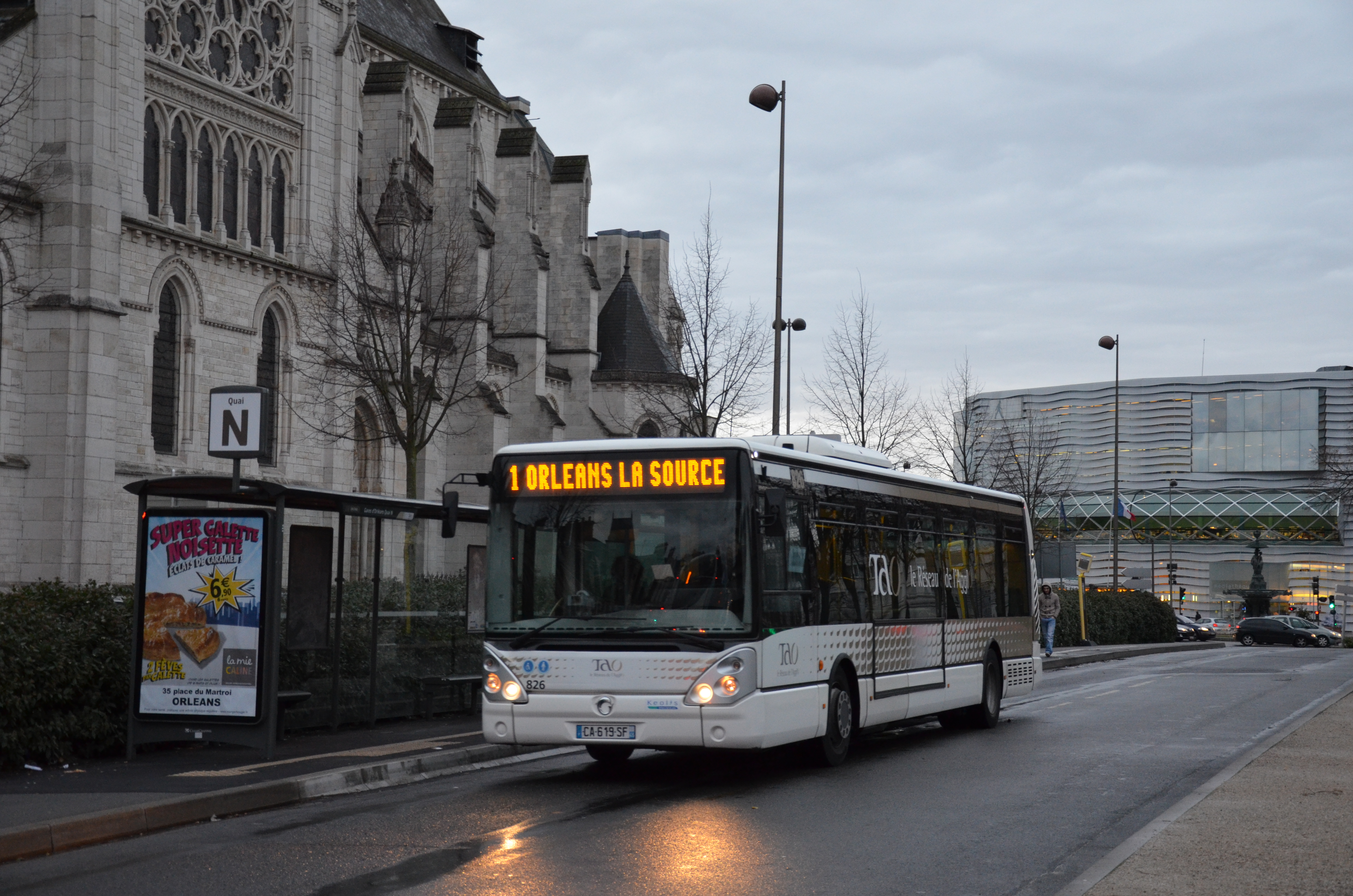 Irisbus Citelis 12 n°826 sur la ligne 1 du réseau TAO d'Orléans en direction d'Orléans La Source, à l'arrêt Médiathèque.